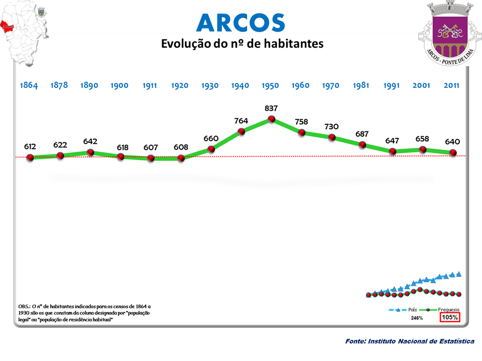 Censos 1864/2011